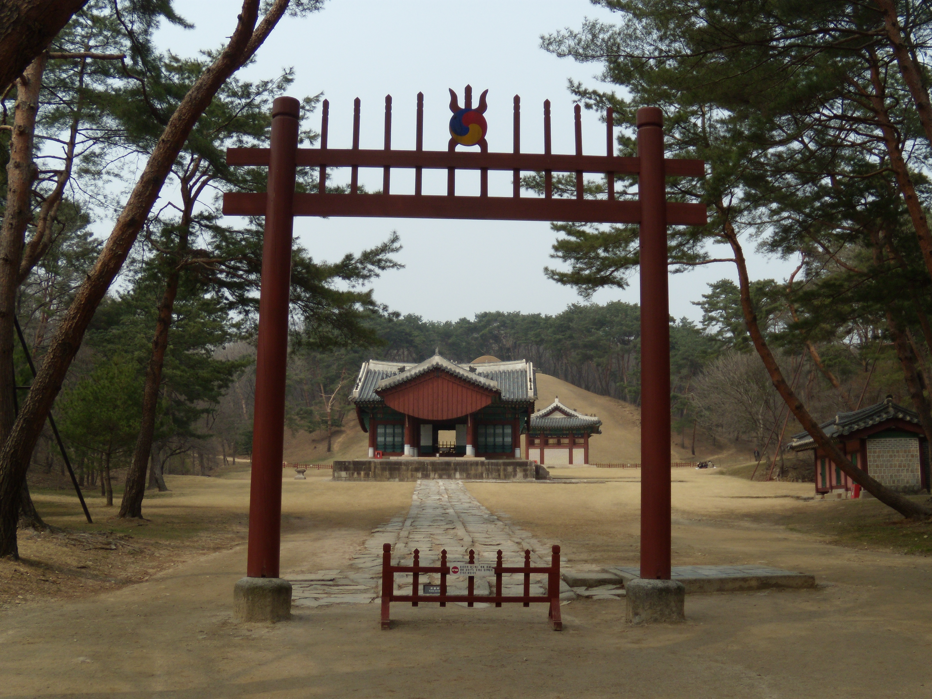 건원릉 전경